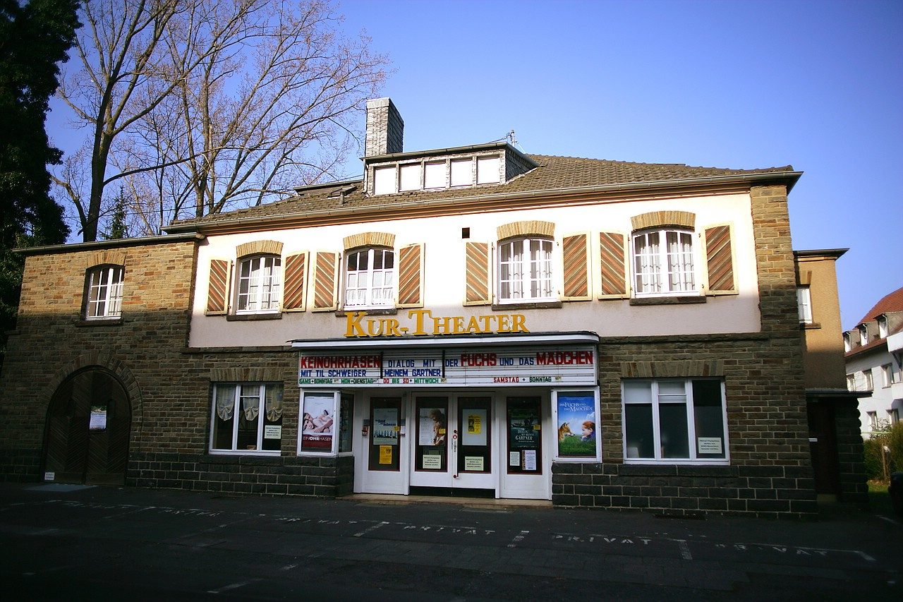 Außenansicht des Kur-Theaters an der Königstrasse in Hennef